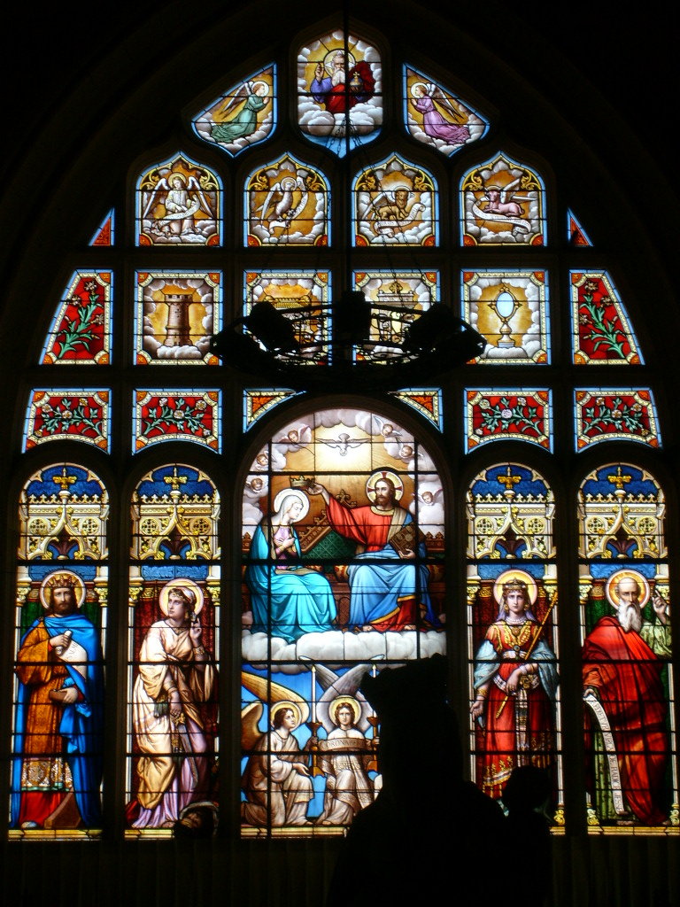 Grande verrière du chevet de l'église Notre-Dame d'Olonne-sur-mer (1884).